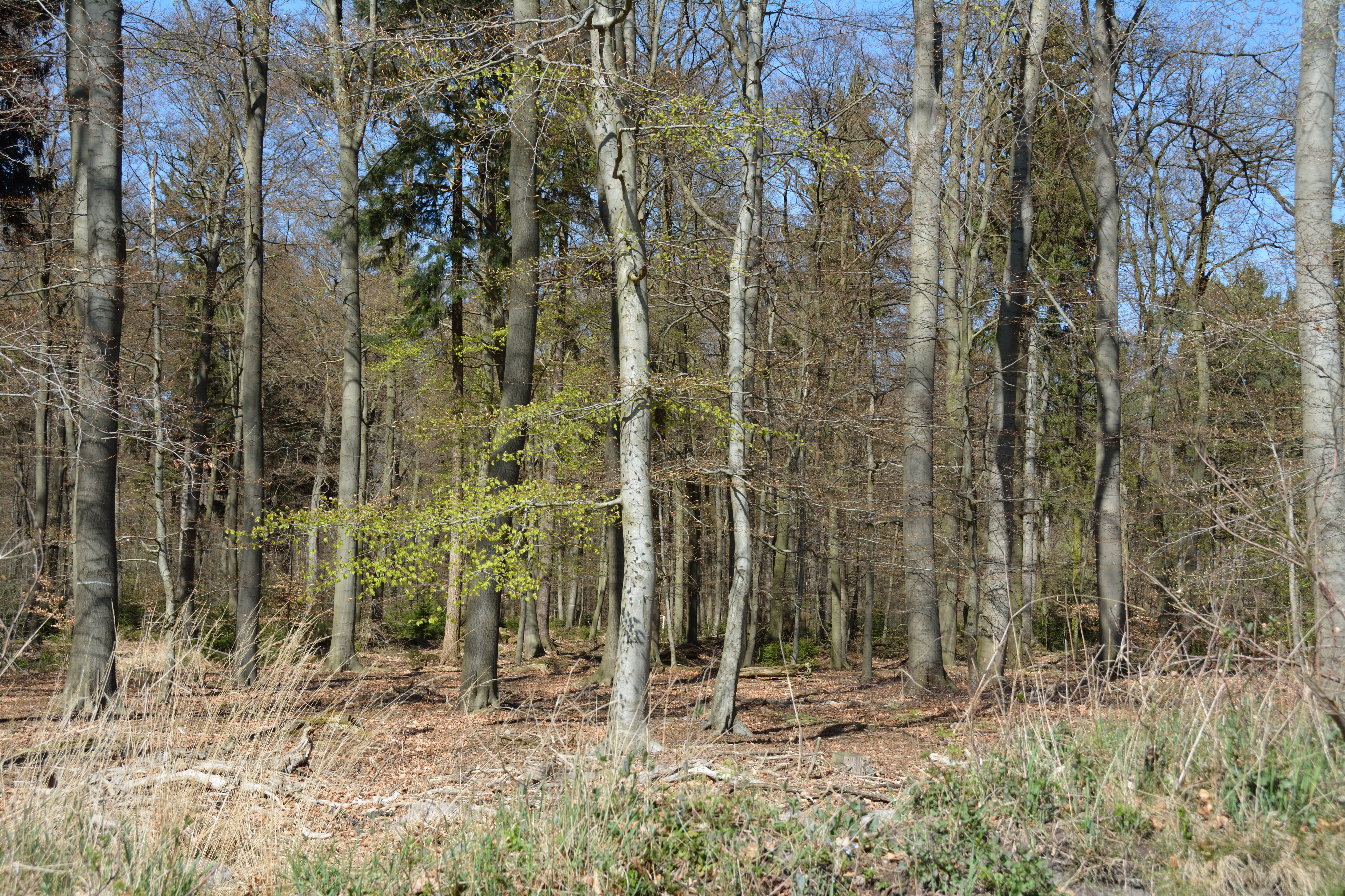 Impressionen aus dem Landschaftsschutzgebiet LSG des Kreises Pinneberg